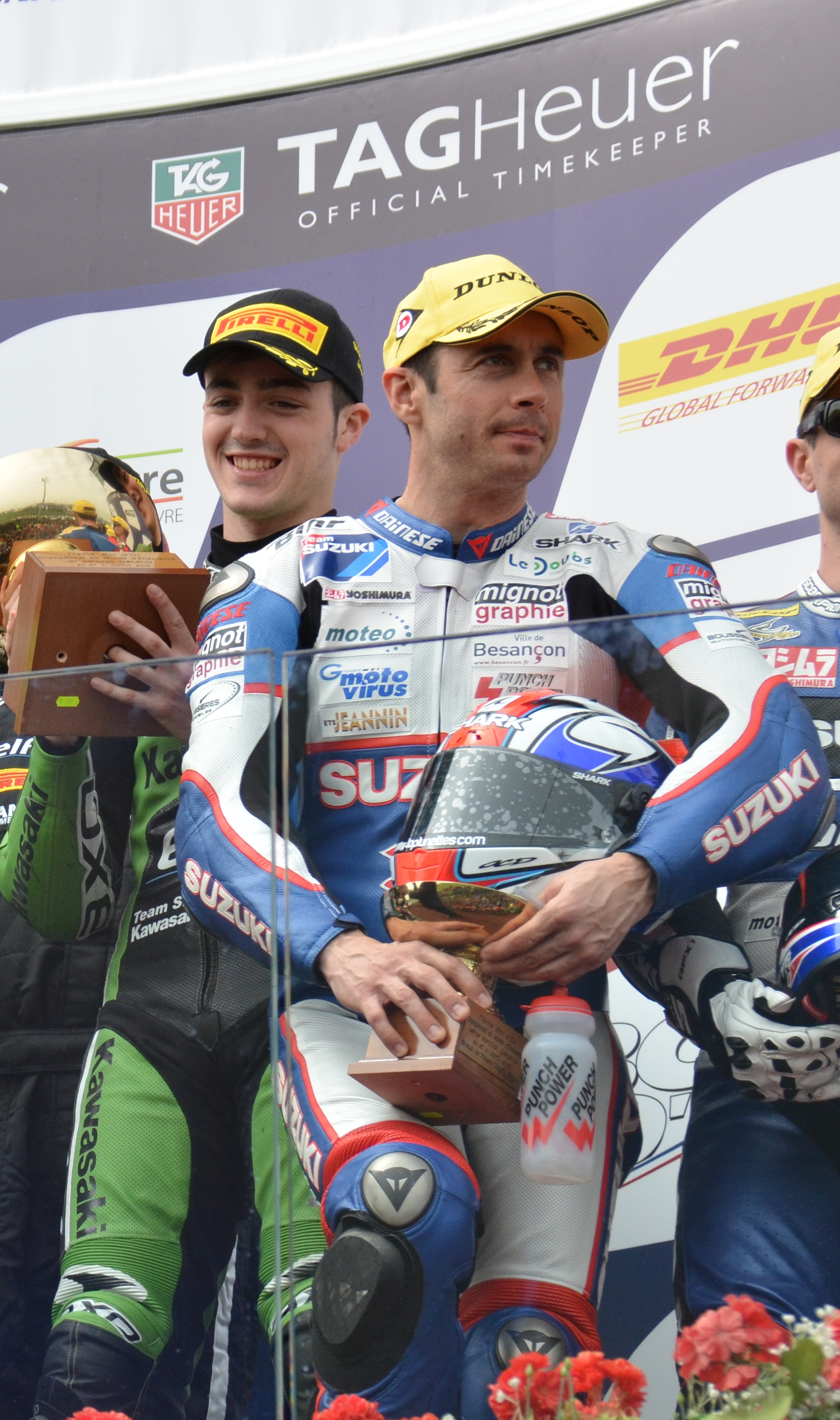 Bol d'Or 2013